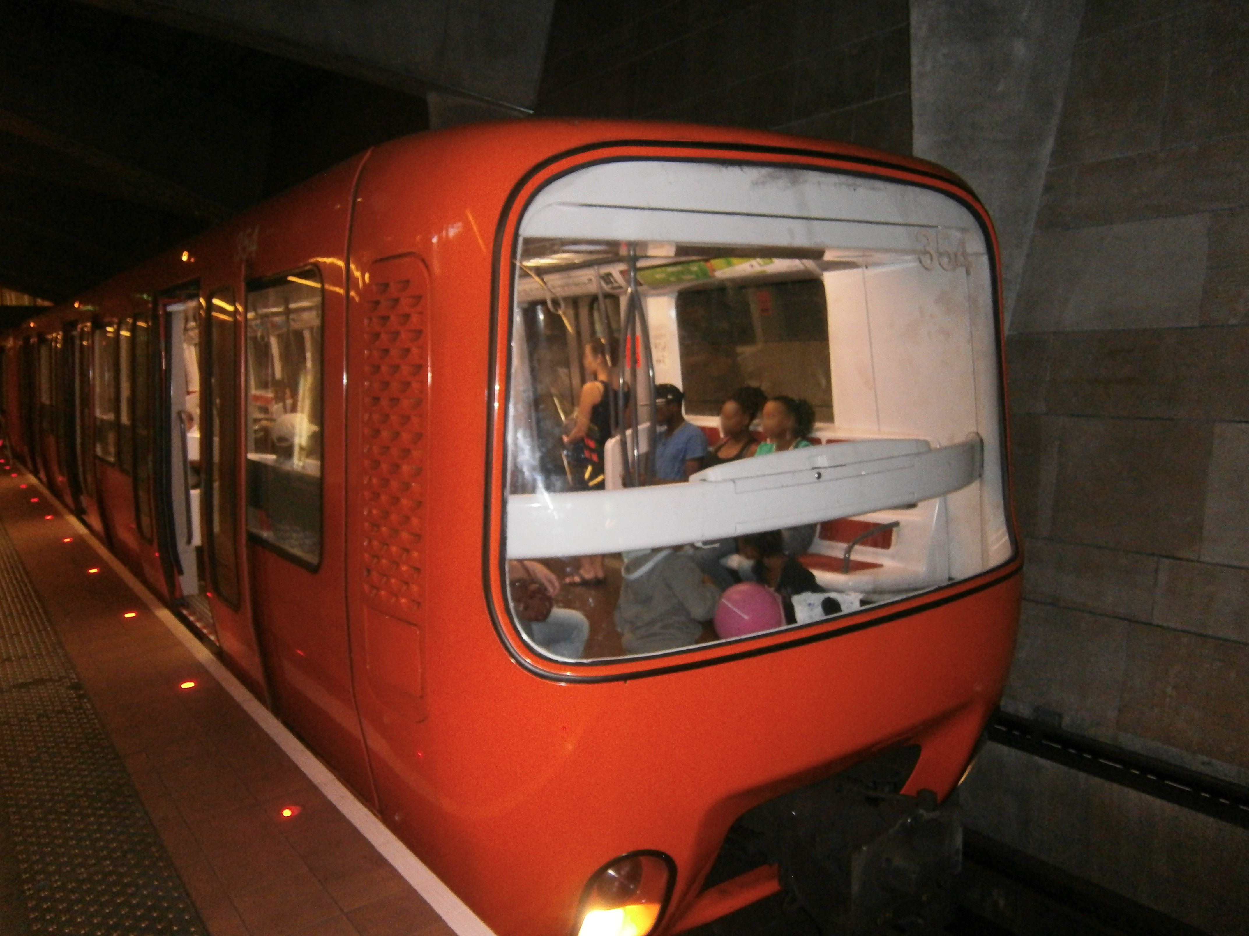 Лионский метрополитен, поезд на станции Valmy